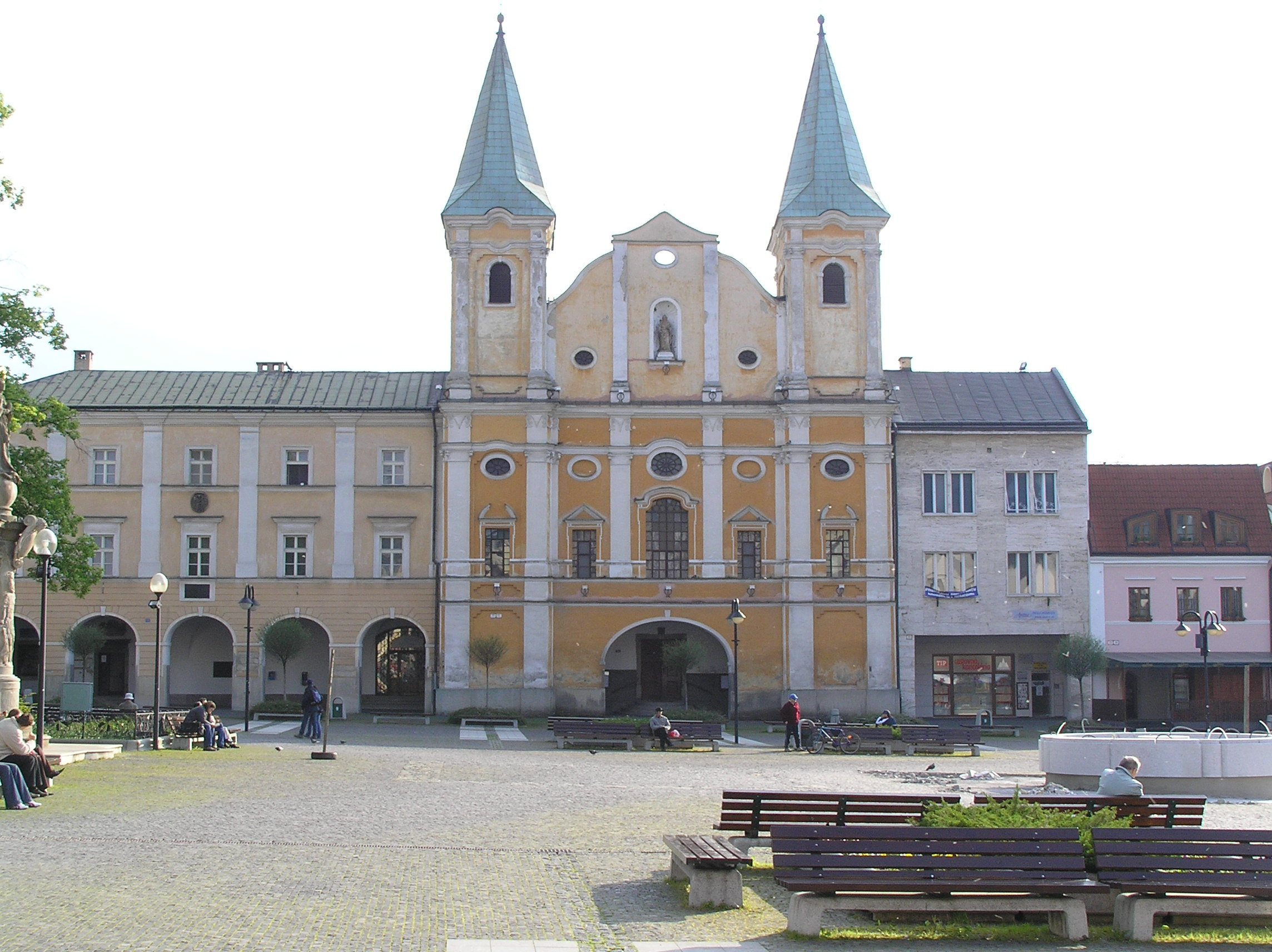 Kostol sv. Pavla apoštola Mariánske námestie, Žilina